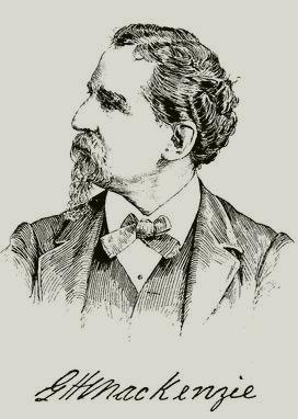 George Henry Mackenzie